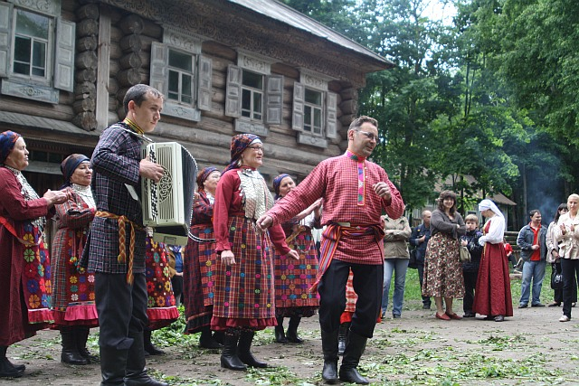 Выступление народного фольклорного коллектива из Удмуртии на Щелоковском хуторе